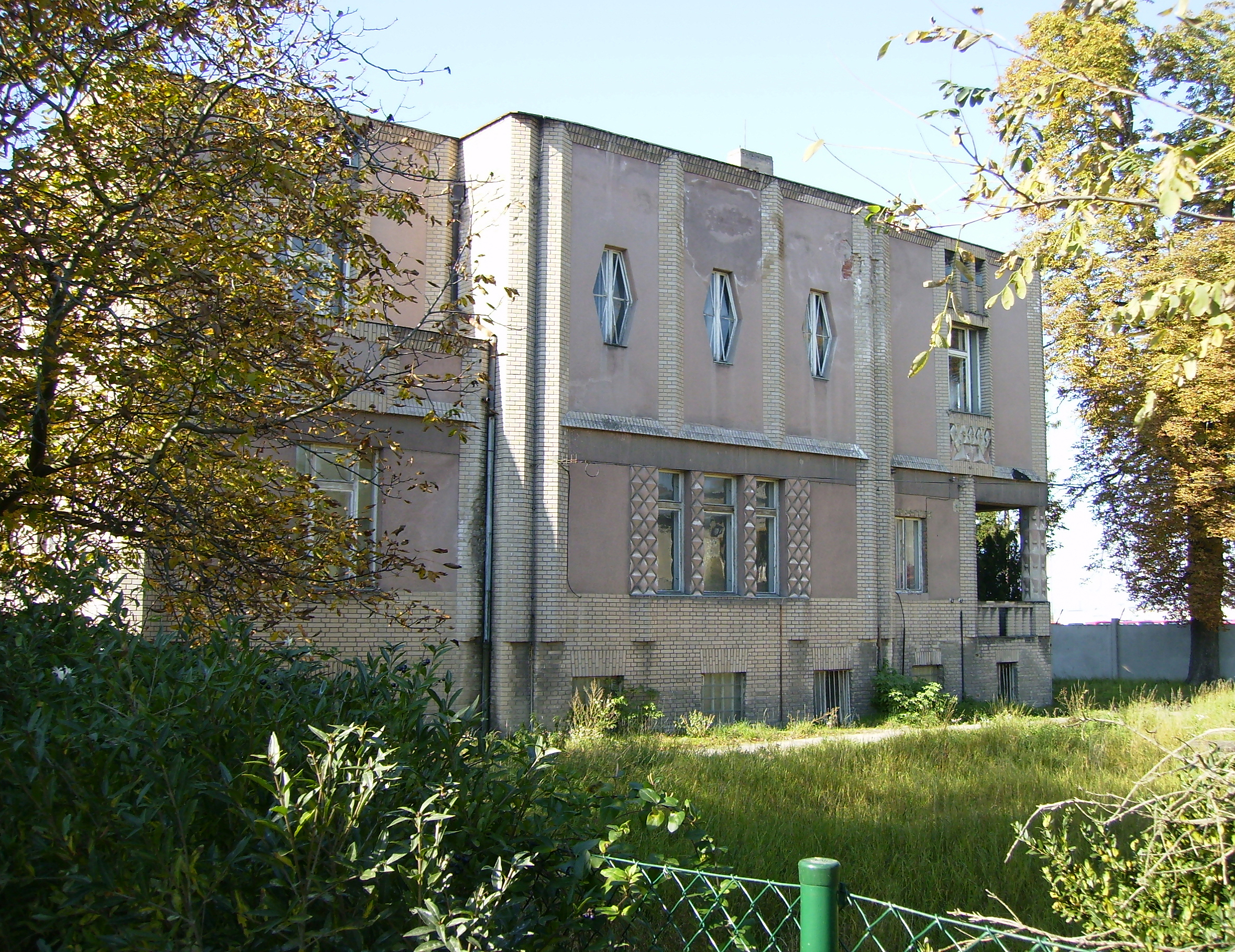 Emil Králíček (1877-1930): kubistická vila rady Beniese v Litoli (1912-1913)